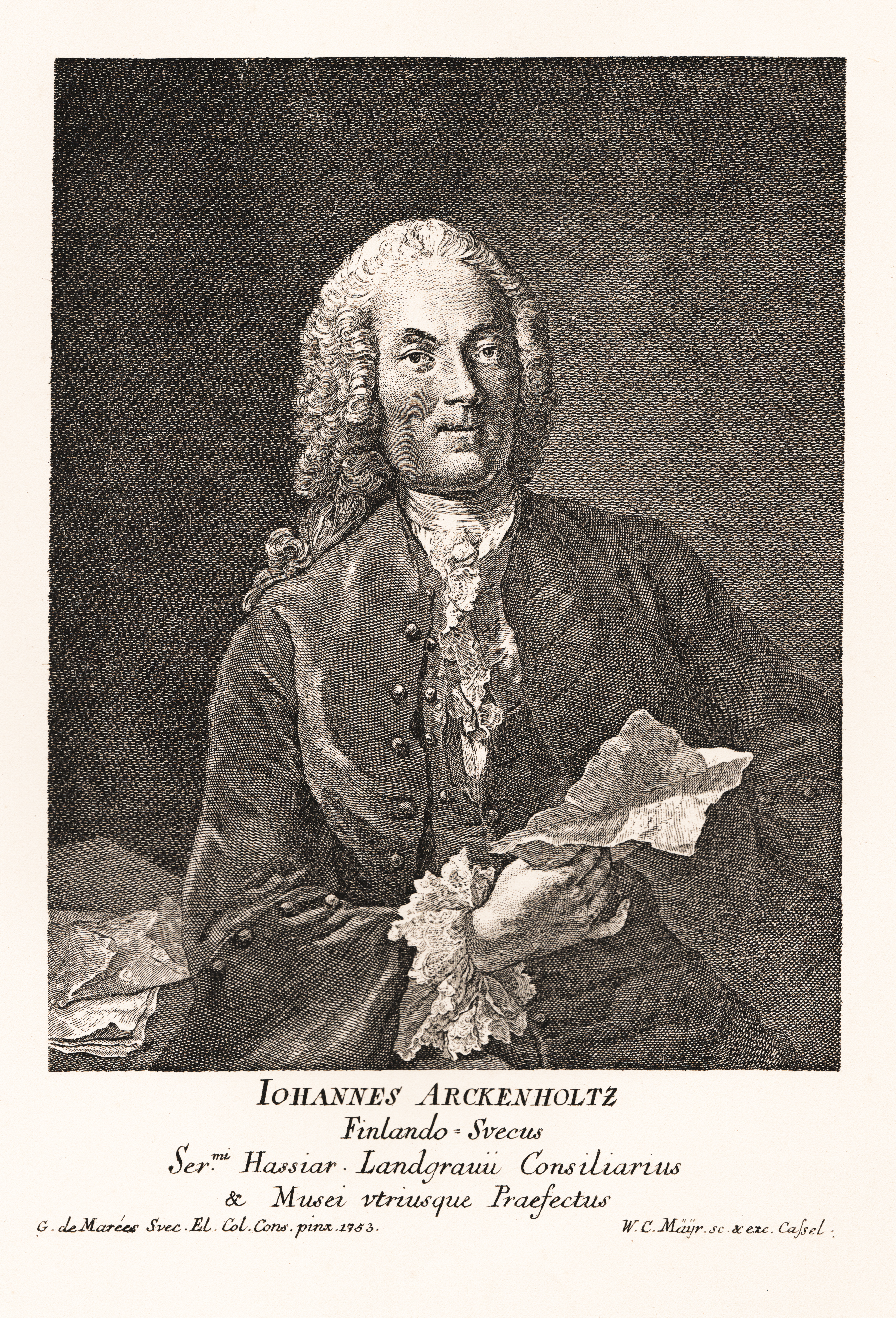 Johan Arckenholtz (1695-1777). Kopparsticket har till förebild G. Desmarées präktiga, Upsala universitet tillhöriga porträtt af Arckenholtz, som af denne själf testamenterats till universitetsbiblioteket. Gravyren, som på ett ej särdeles lyckligt sätt återgifver den lifliga och intelligenta bild Desmarées lämnat oss af partigängaren och historikern, är utförd i Cassel af W. C. Mayr, en mindre framstående gravör. Det oljefärgs-porträtt af Arckenholtz, som finnes vid Gripsholm är en kopia af Desmarées original i Upsala.